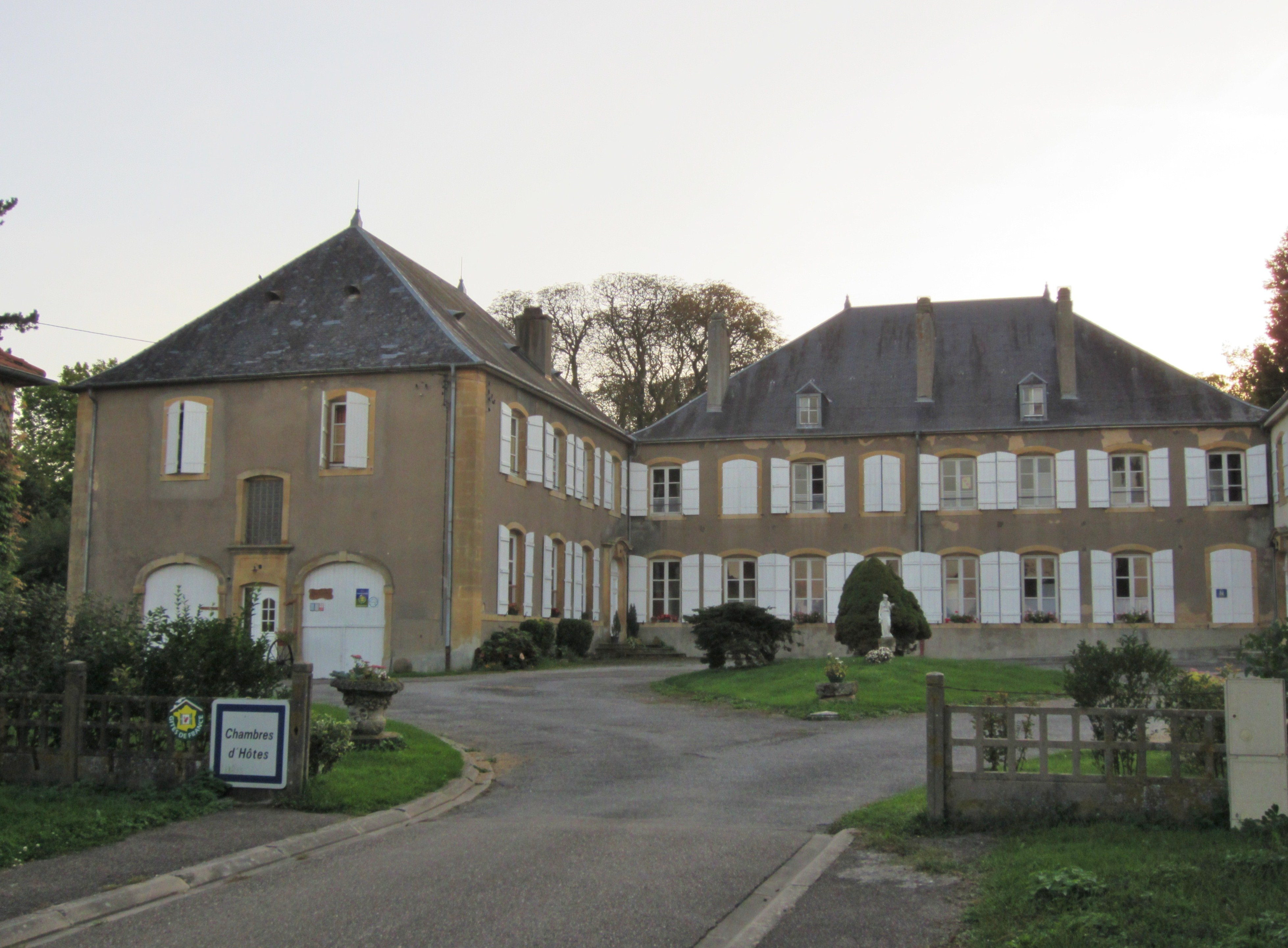 Description chateau Puxe chateau Puxe